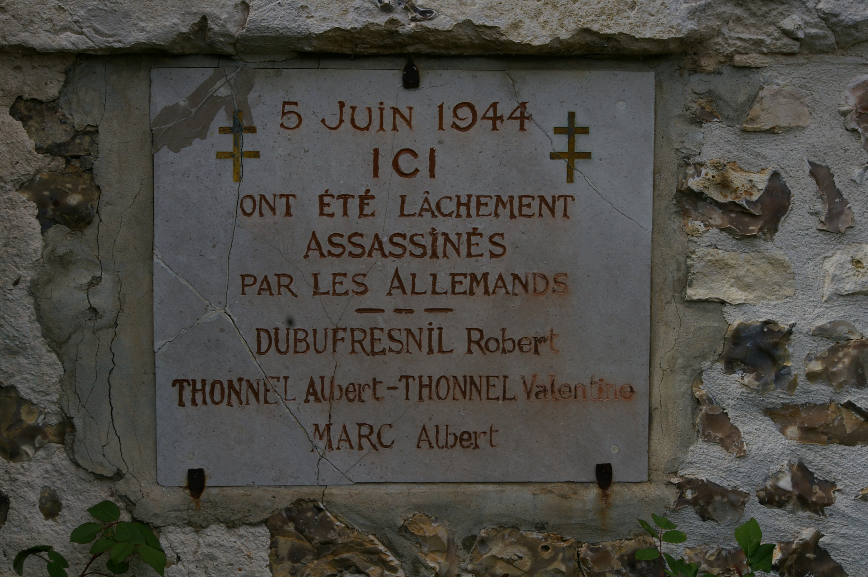 Plaque situé à Fourmetot, la ferme de l'Épinay